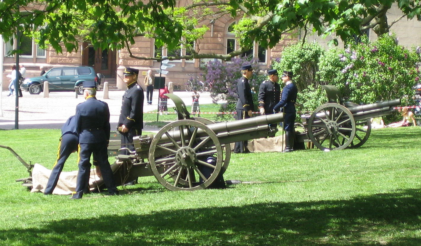 Kanonsalut vid doktorspromovering i Lund 2005. Wendes Artilleridivision med kanon m/02